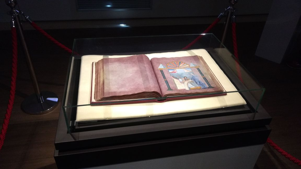 Aktuelle Präsentation des CPR im Diözesanmuseum von Rossano